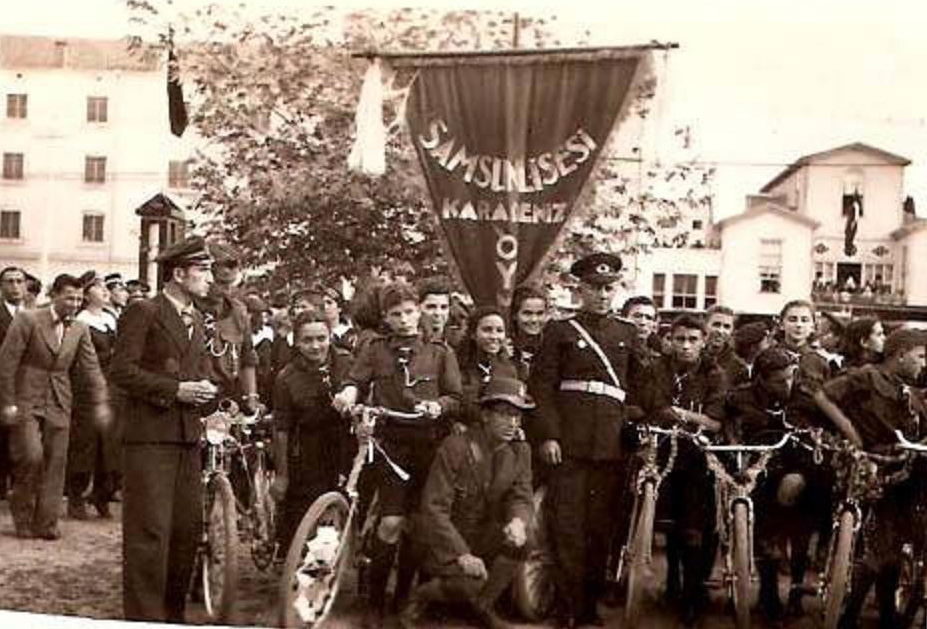 29 Ekim kutlamaları sırasında Samsun Lisesi izcileri törende.